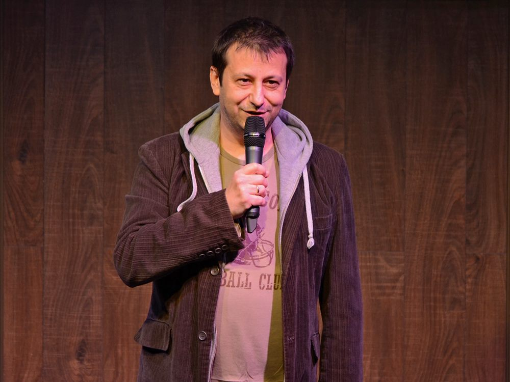 Aradi Tibor (1971. január 31. –) magyar humorista, újságíró.